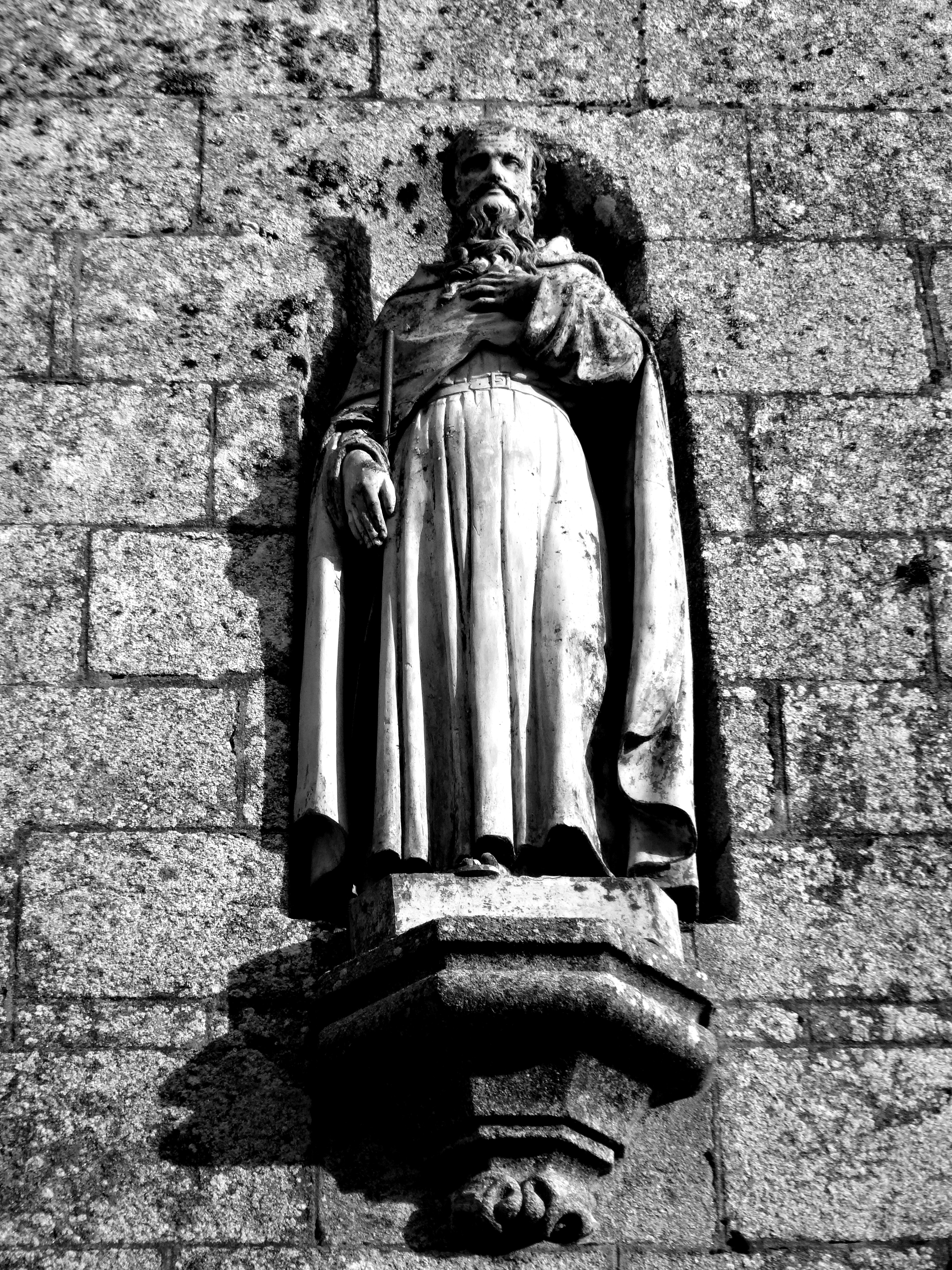 Saint Tudy, façade de l'église de L'île-Tudy.